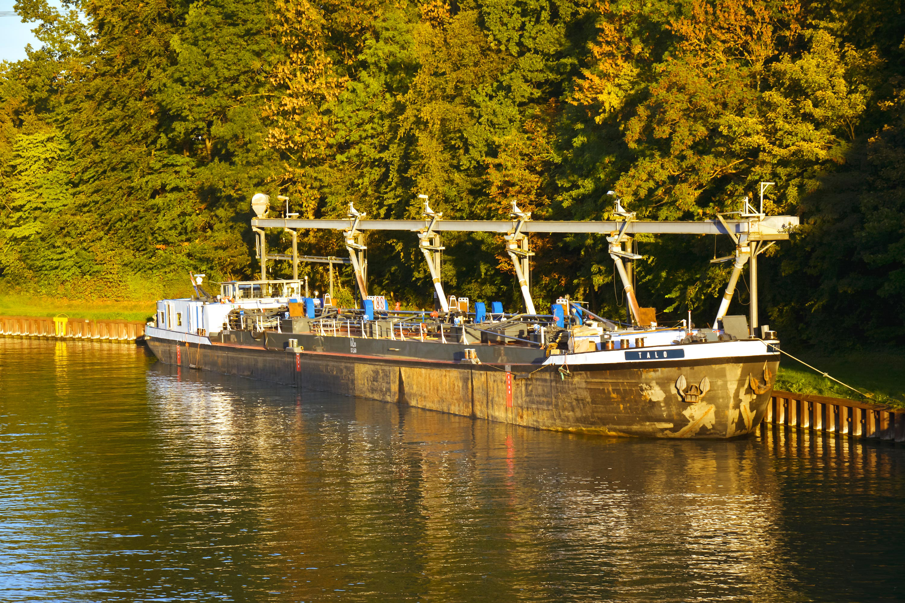 Hier wird Getreide aus der Region in Transportschiffe verladen.